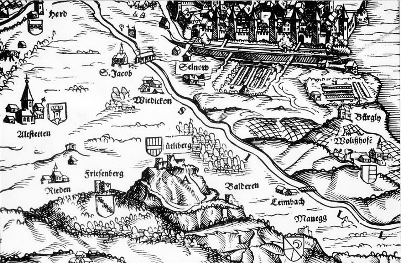 Das Gebiet westlich und südlich der Stadt Zürich, im Zentrum das heutige Quartier Wiedikon auf der Karte von Jos Murer aus dem Jahr 1566. Zu erkennen sind unter anderem der Uetliberg mit den Burgen Friesenberg und Uetliburg, Baldern und Manegg sowie die Stadtquartiere bzw. Stadtteile Hard mit dem Hardturm (links oben), Altstetten, St. Jakob (Aussersihl) mit der im Alten Zürichkrieg schichsalshaften Brücke, Selnau, Wollishofen und Leimbach.